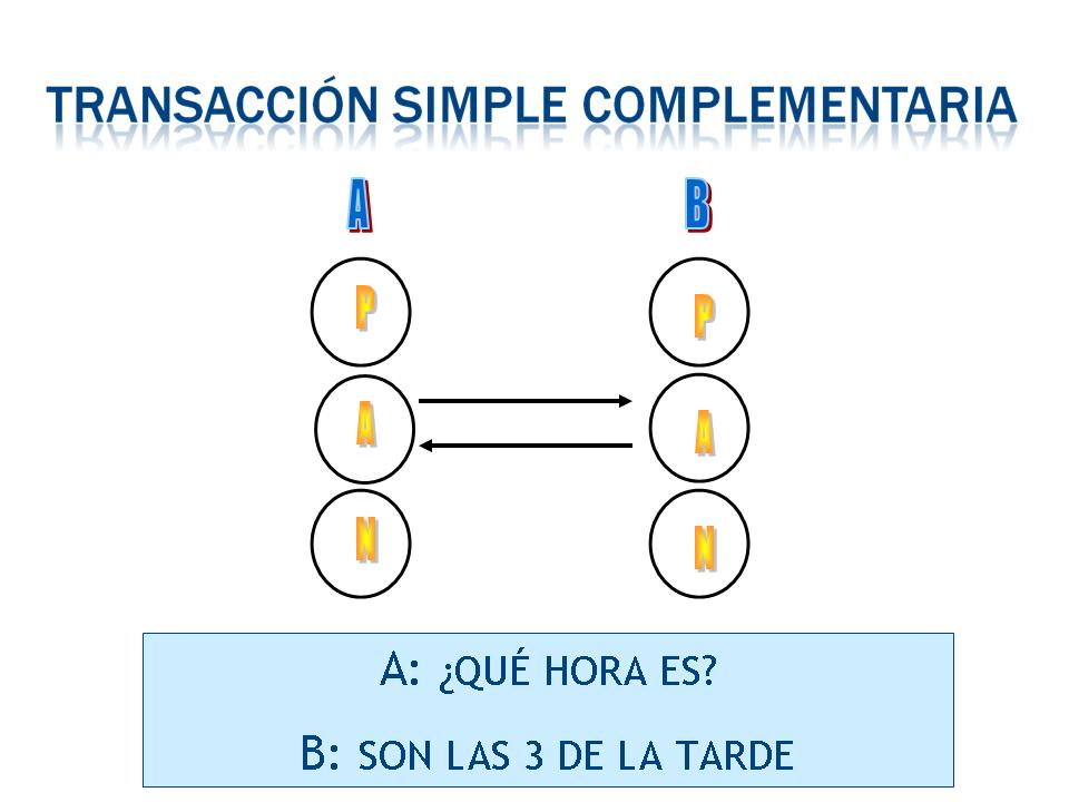 Transaccion simple complementaria